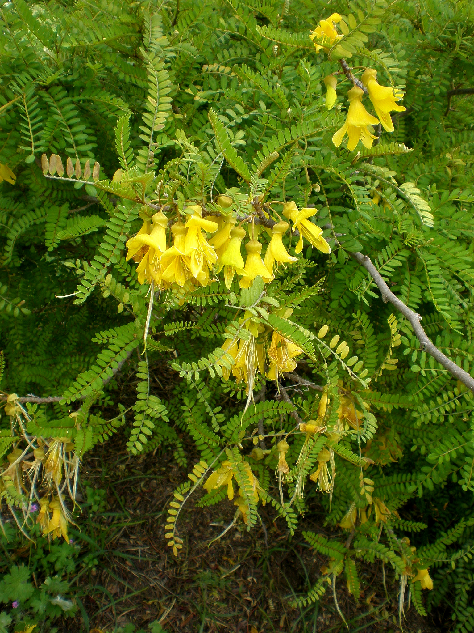 Jardín Botánico de Barcelona.